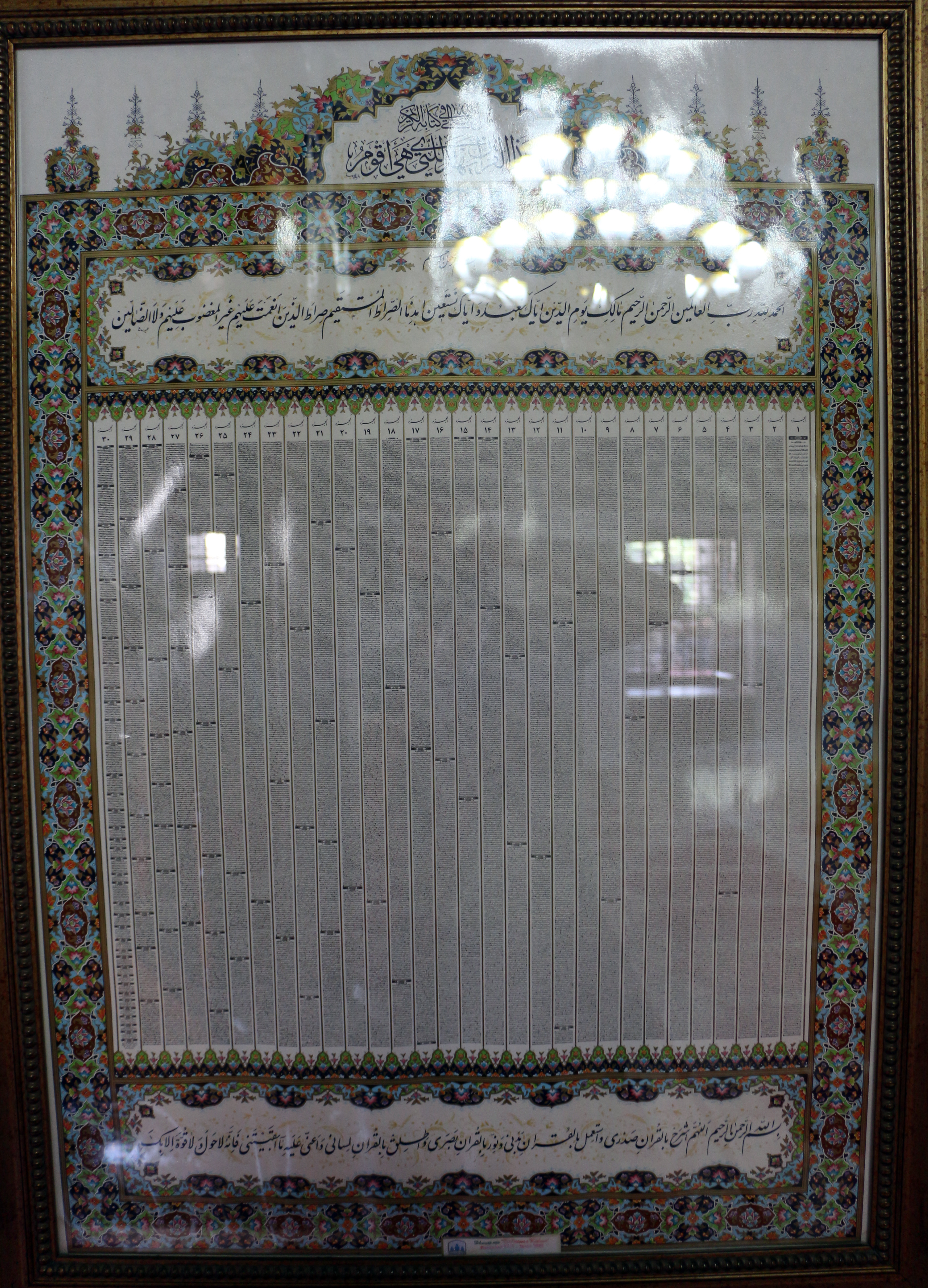 Xhamia e Ethem Beut